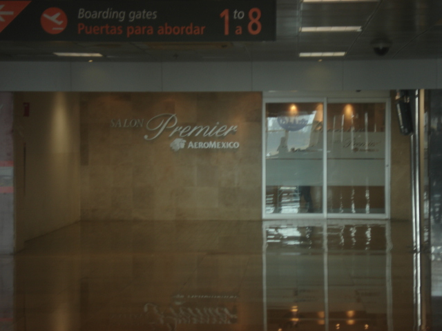 Terminar 2 del Aeropuerto